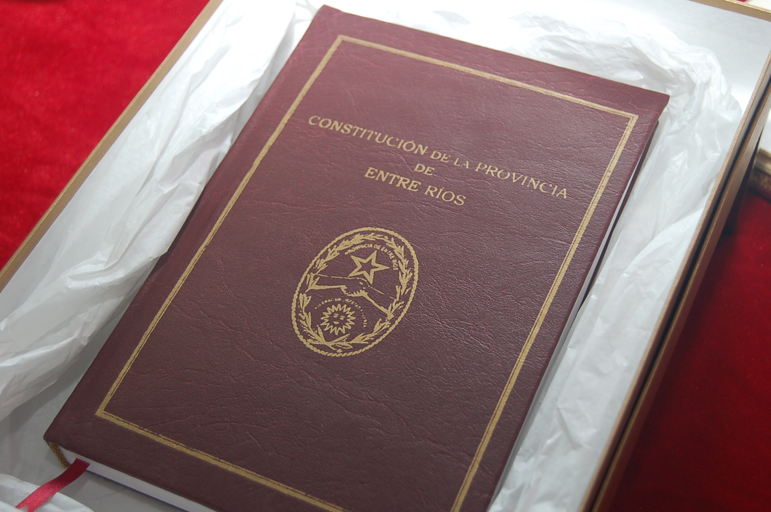 Ejemplar de la Constitución de la Provincia de Entre Ríos impreso tras la Reforma Constitucional de 2008.